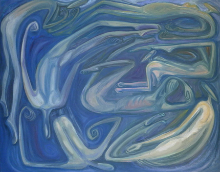 Dílo Miluše Poupětové